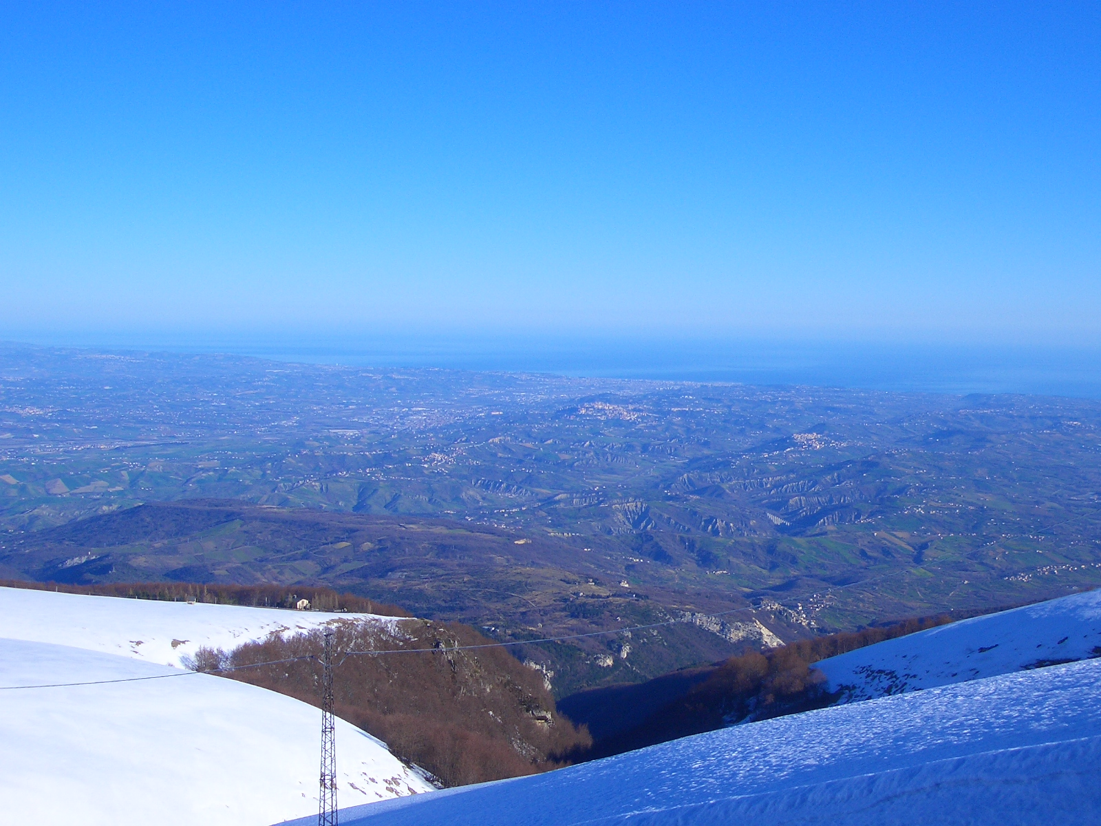 panorama di chieti e Pescara visto dalla Maiella